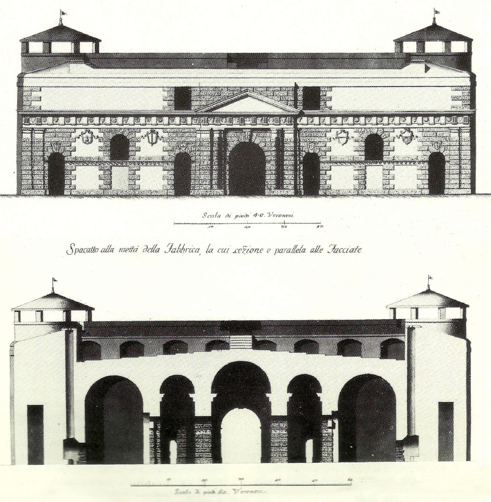 Porta Palio a Verona nel progetto di Michele Sanmicheli